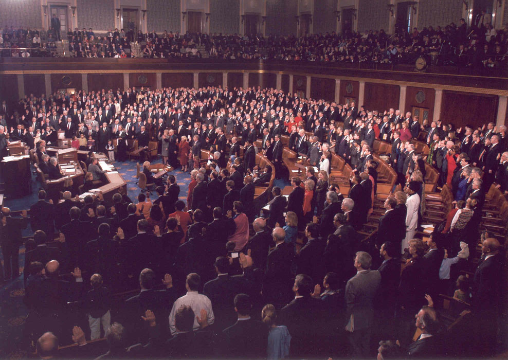 Image from federal site